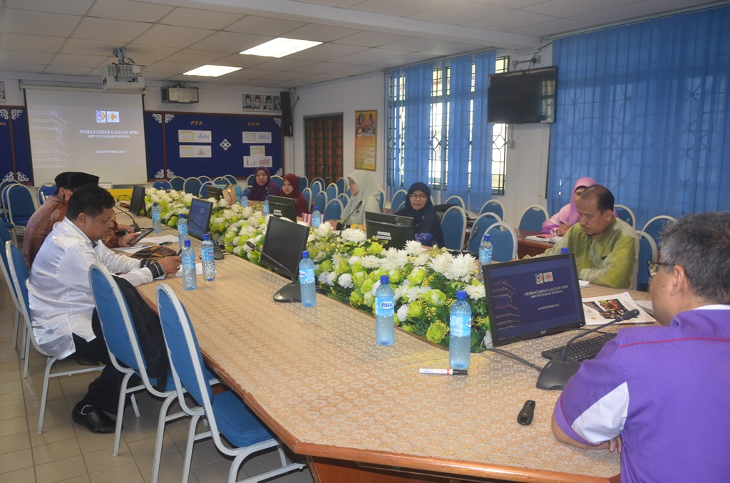 Mesyuarat Khas Laluan Akademik bersama Pengawai dari Bahagian Pengurusan Sekolah Berasrama Penuh & Sekolah Kecemerlangan (BPSBPSK) sedang dilaksanakan di Bilik Mesyuarat SEPINTAR pada 28 September 2017.